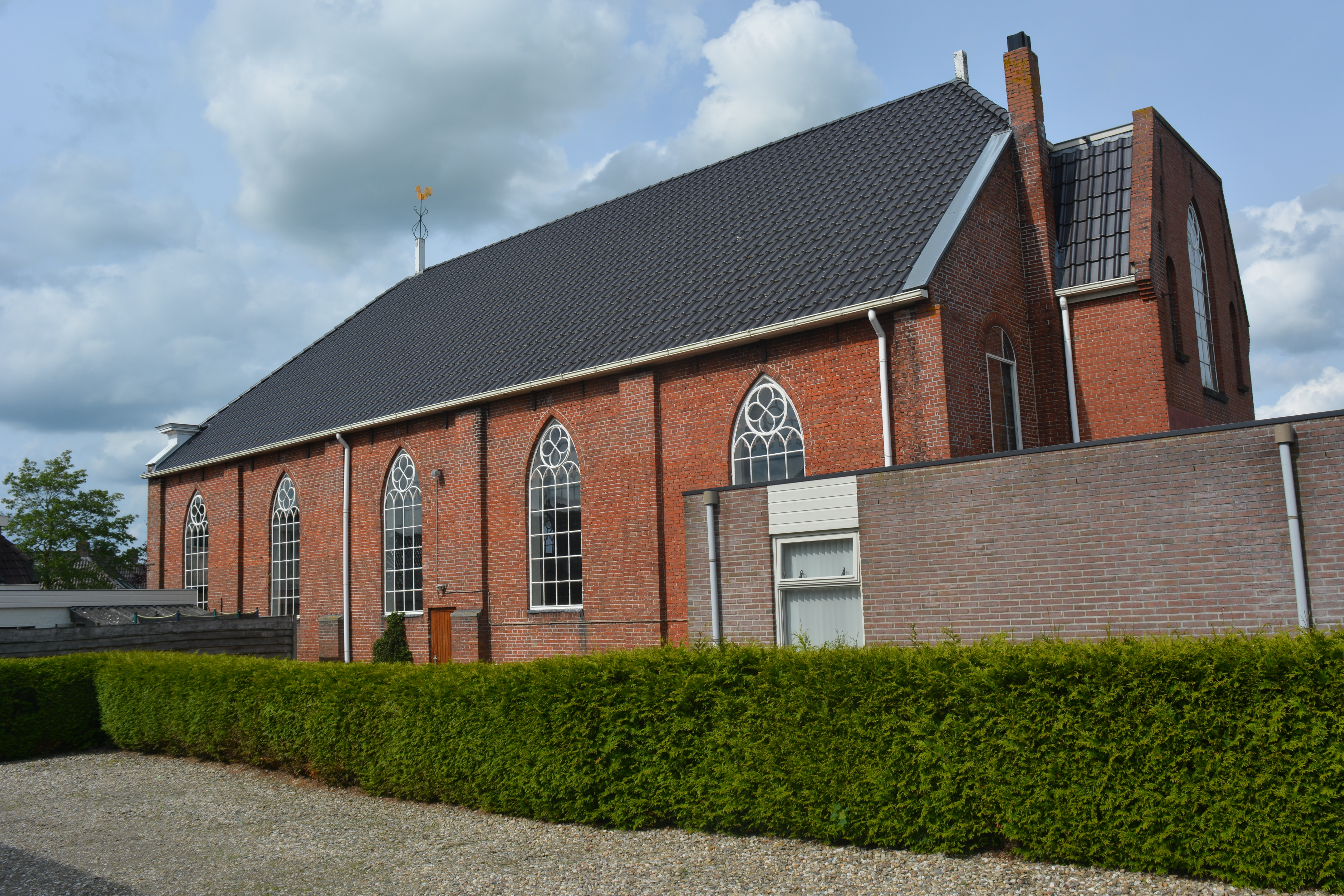 Gereformeerde kerk (Open Hofkerk), Burum